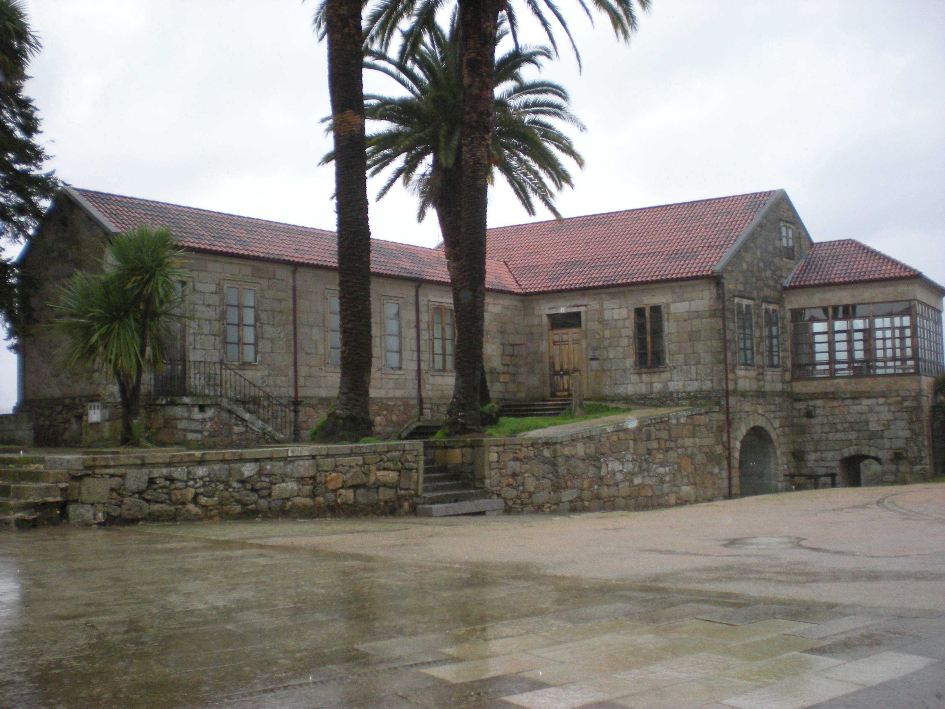 Denominado como Cuevas de Doña Urraca y Castillo de Salvaterra.